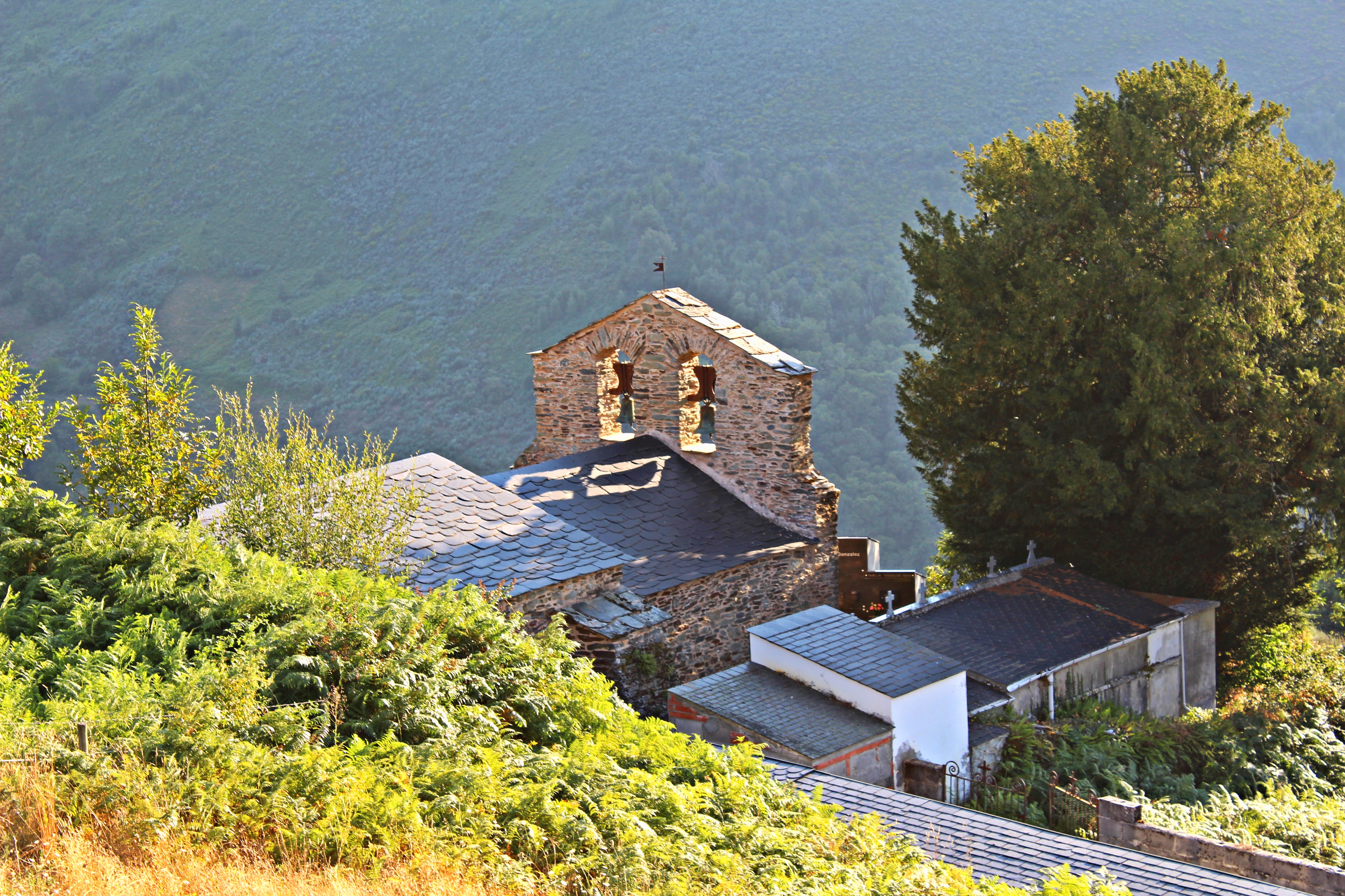 Villafeile, comarca de El Bierzo, provincia de León